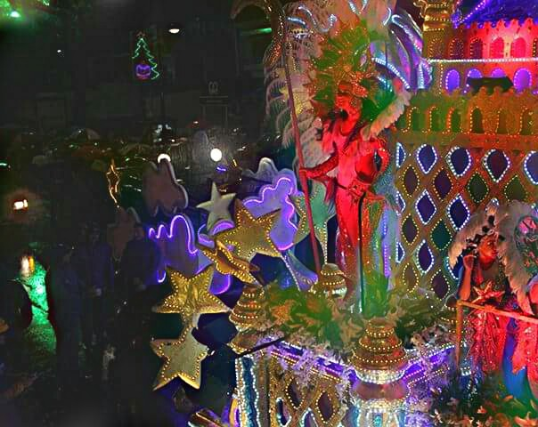 Festival de la Luz 2014